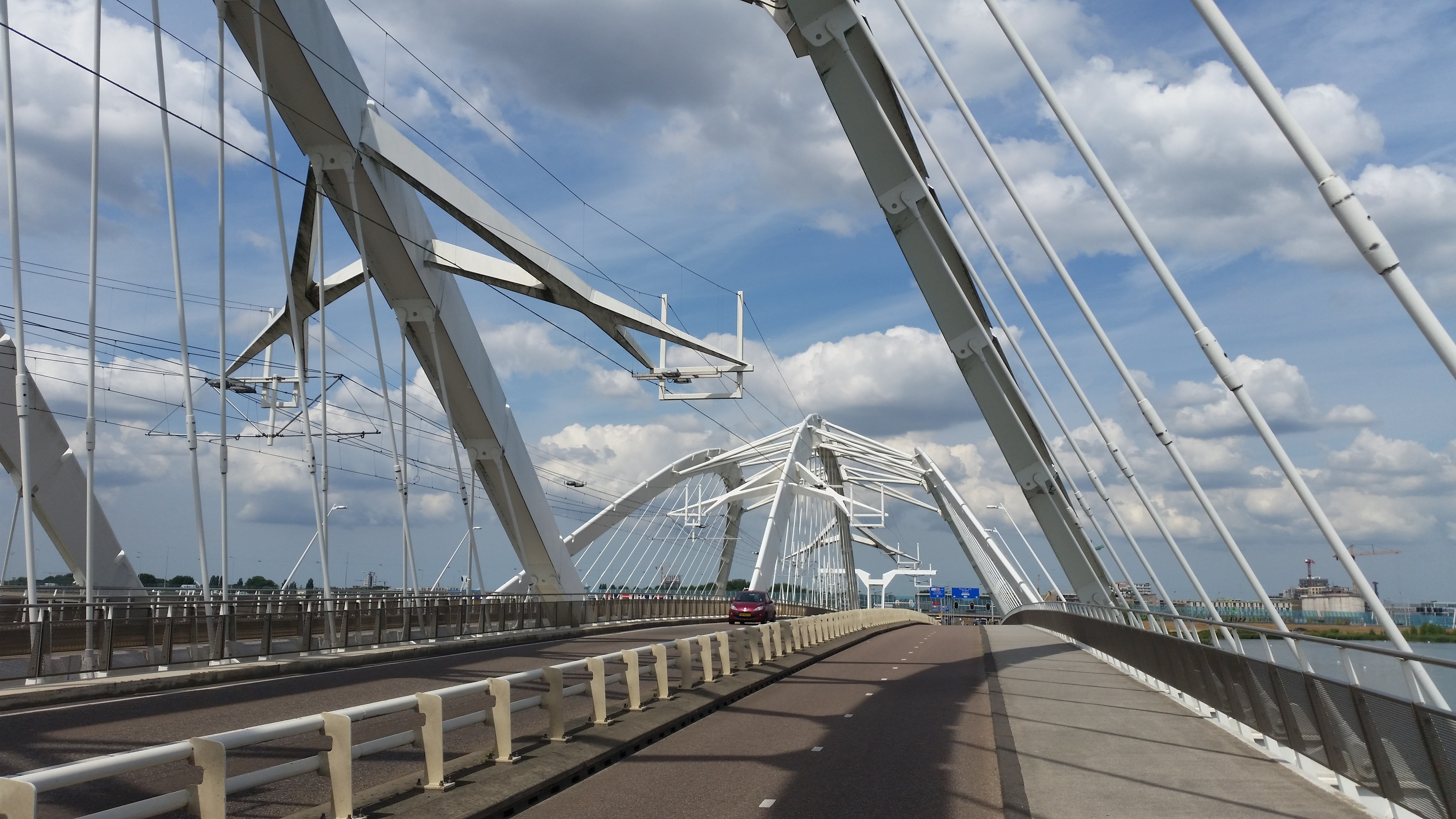 Enneüs Heermabrug, overzichtsfoto